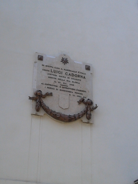 Immagine della placca commemorativa di Luigi Cadorna